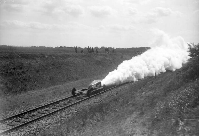 Der sensationelle Start des ersten Raketenwagens auf Eisenbahnschienen in Burgwedel b. / Hannover! Der Raketenwagen auf Schienen erreichte eine Stundengeschwindigkeit von 254 km und verbesserte den Weltrecord für Fahrzeuge auf Schienen um 39 km in der Stunde. Der Raketenwagen auf Eisenbahnschienen während seiner rasenden Weltrecordfahrt im 250 km-Tempo, eine ungeheure Rauchwolke hinterlassend.